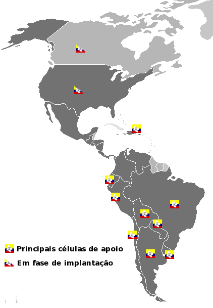 Principais células das FARC e em fase de implantação (fonte: ). Acredita-se que as FARC tenham células atuantes em pelo menos 30 países.